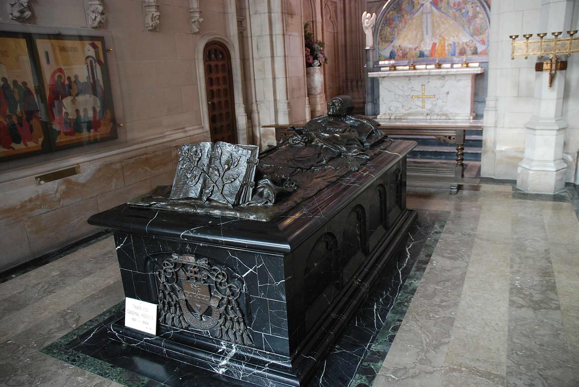 Grafmonument van kardinaal Désiré-Joseph Mercier in de Sint-Romboutskathedraal in Mechelen, België